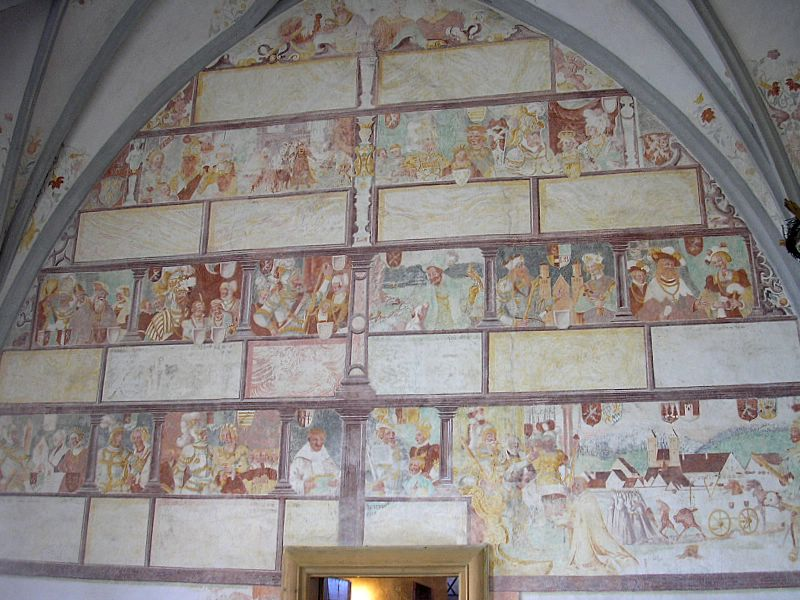 Klosterkirche St. Johannes d. T. (Steingaden, Oberbayern). Die „Welfengenealogie“ in der Vorhalle“ (Nordwand). Eigene Aufnahme, Sept. 2006 / Steingaden Monastery (Upper Bavaria, Germany). Church of St. John Baptist. Genealogy of the “Welfen” family. (Dukes of Bavaria). Own photo, Sept. 2006